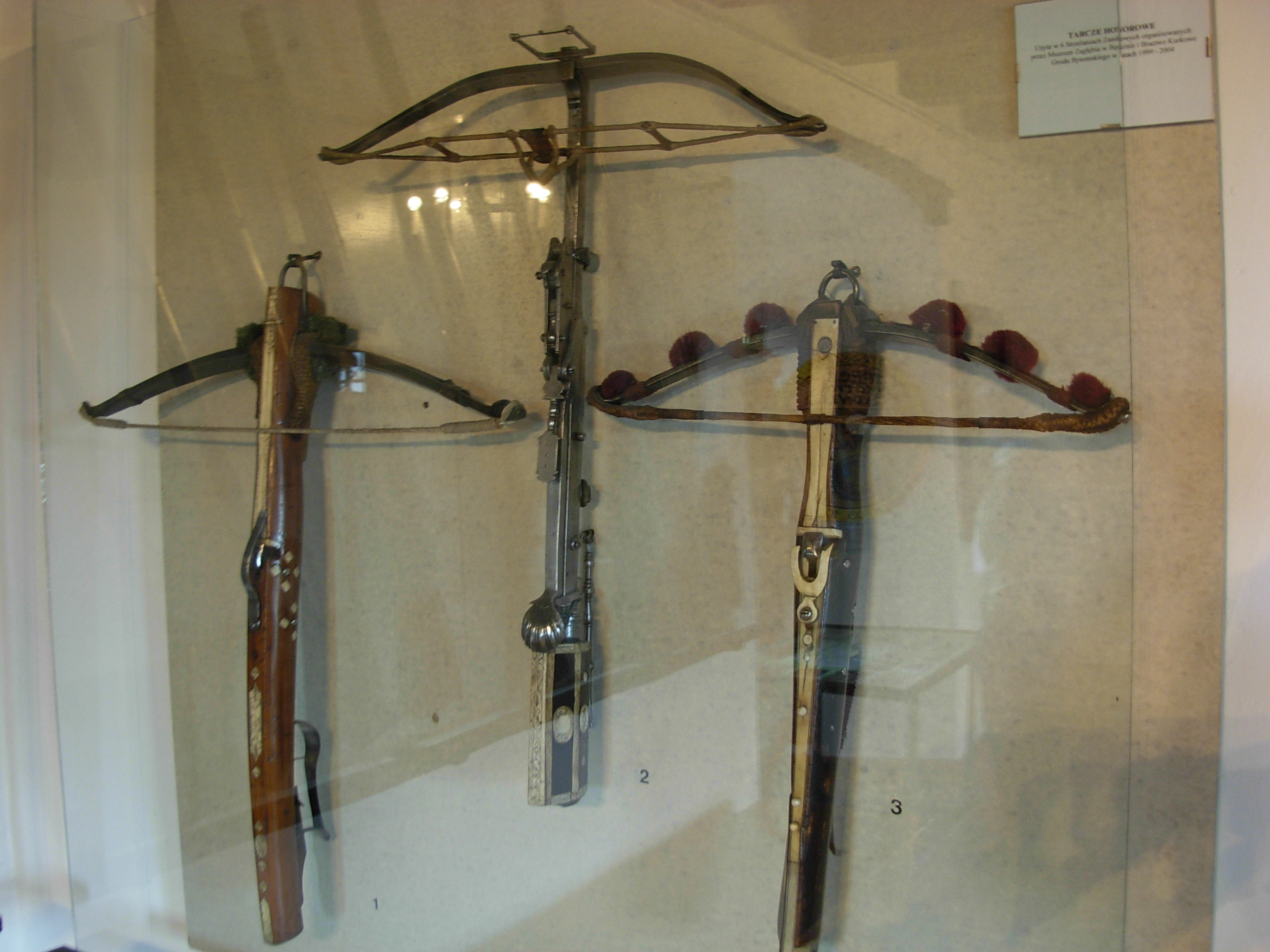 Items from Muzeum Zagłębia, in Castle in Będzin, Poland.